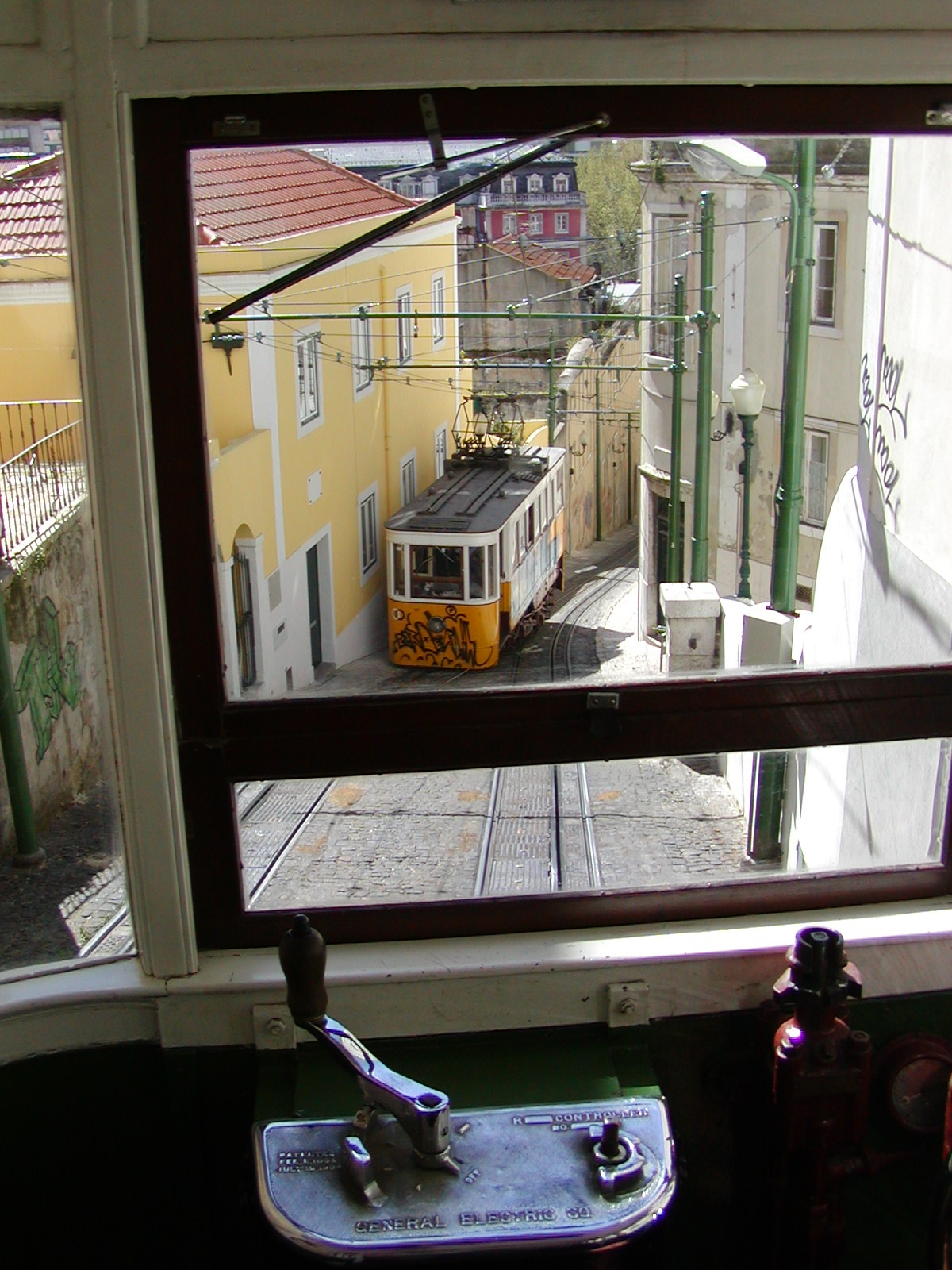 Straßenbahnähnliche Standseilbahn in Lissabon